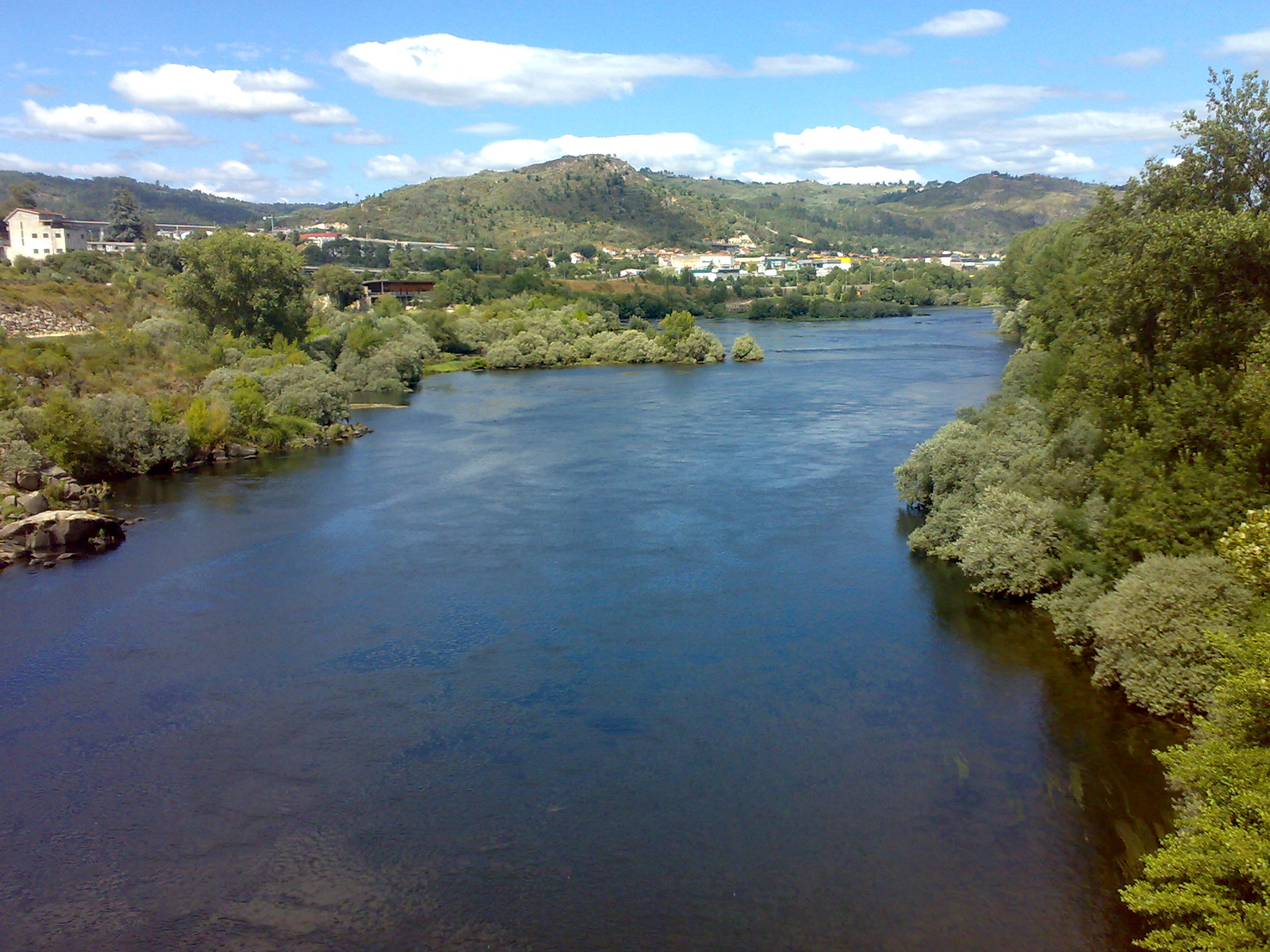 rio MIÑO en su paso por ORENSE